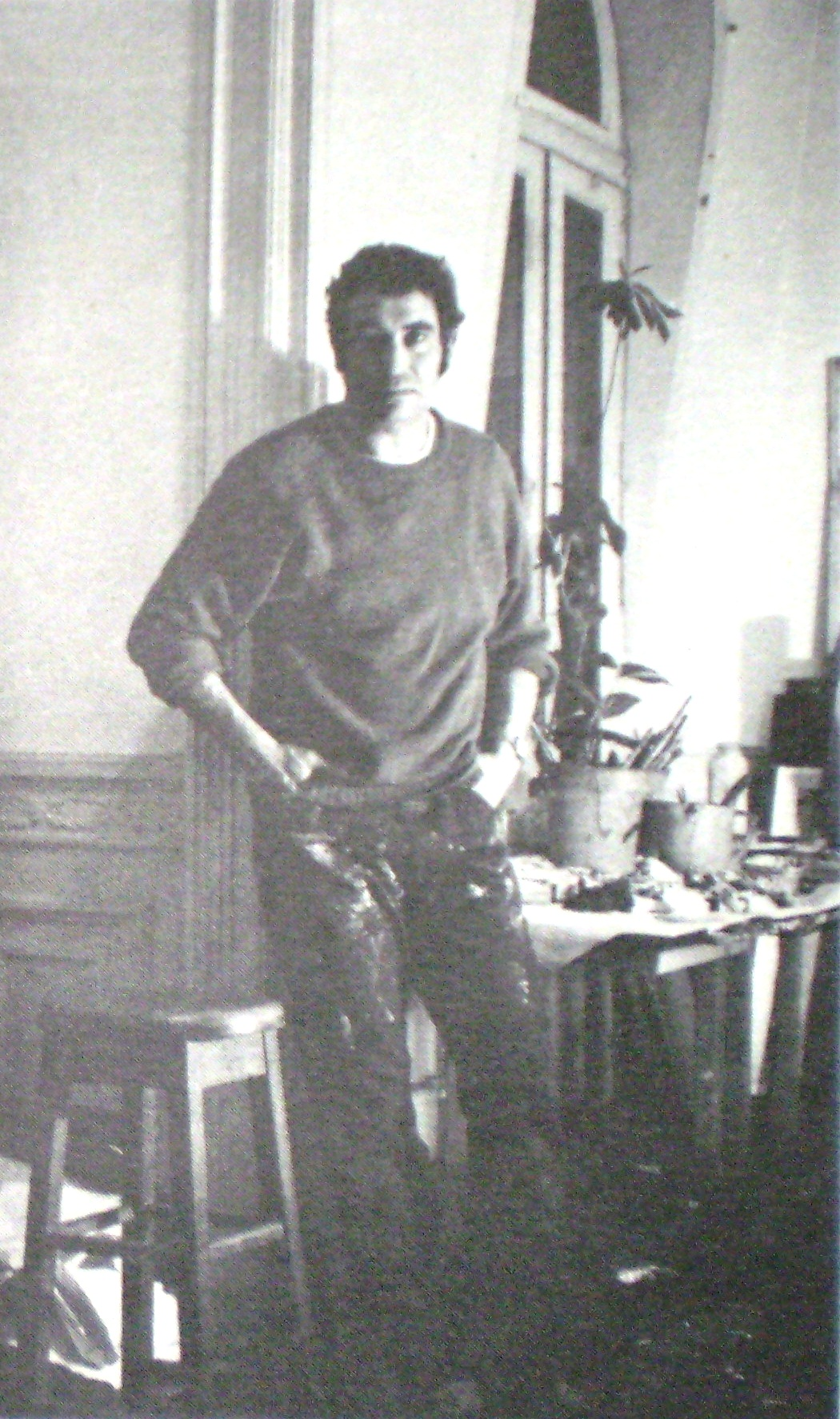 Carlos Alonso en su taller